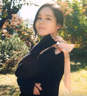 [Marie Claire Korea] 꽃보다 아름다운 한가인